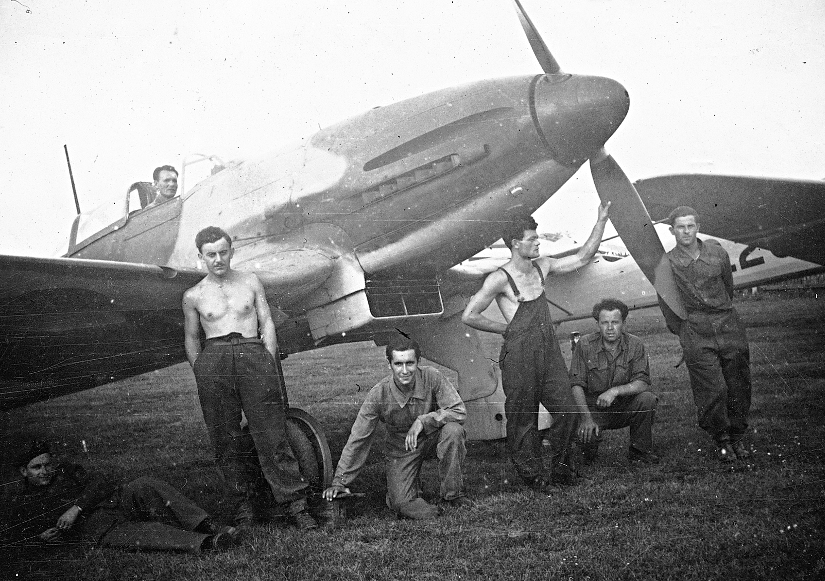 Heinkel He-112B vadászrepülőgép az RKI (Repülő Kisérleti Intézet) állományában. Tags: Royal Hungarian Air Force, Heinkel-brand, German brand, airplane, fighterplane, airport Title: Heinkel He-112B vadászrepülőgép az RKI (Repülő Kisérleti Intézet) állományában.